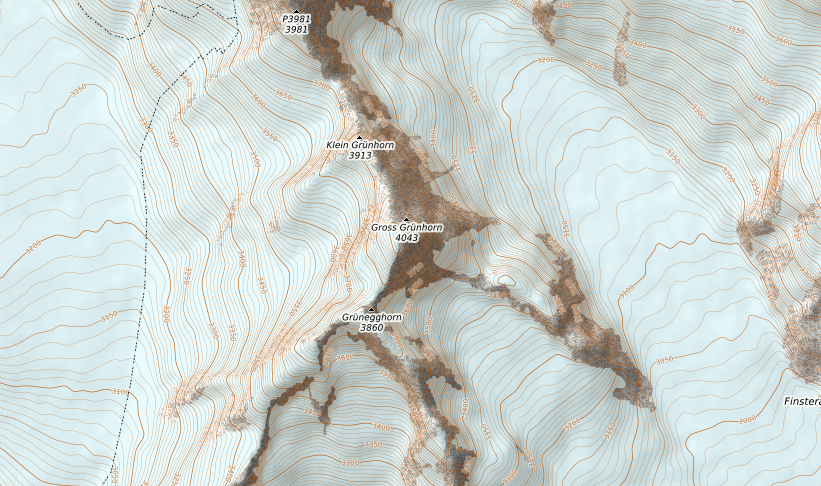 carte réalisée sur umap This map may be incomplete, and may contain errors. Don't rely solely on it for navigation.